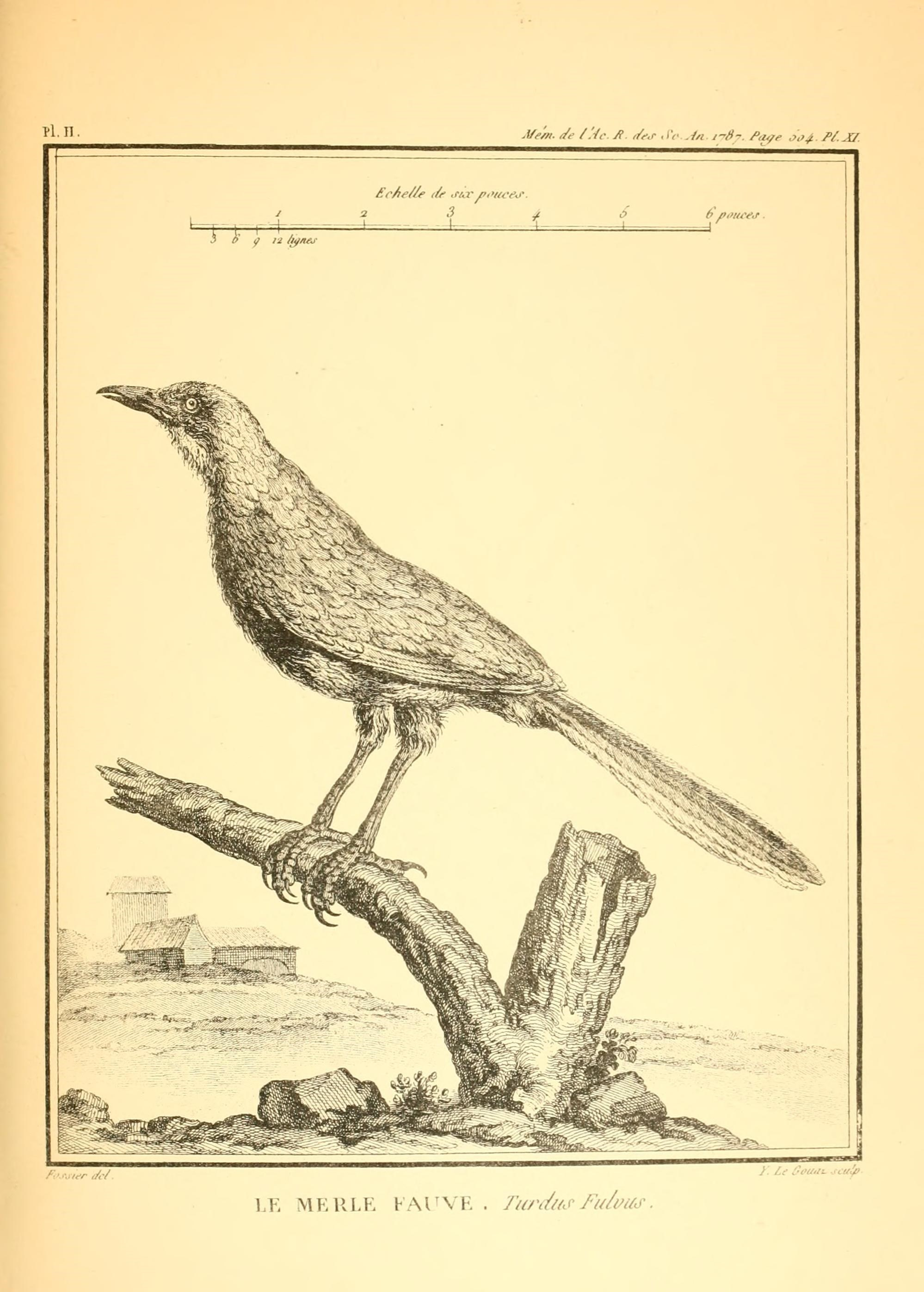 Desfontaines's Mémoire sur quelques nouvelles espèces d'oiseaux des côtes de Barbarie.. London,1880.. Desfontaines's Mémoire sur quelques nouvelles espèces d'oiseaux des côtes de Barbarie London,1880. This file comes from the Biodiversity Heritage Library. This tag does not indicate the copyright status of the attached work. A normal copyright tag is still required. See Commons:Licensing.